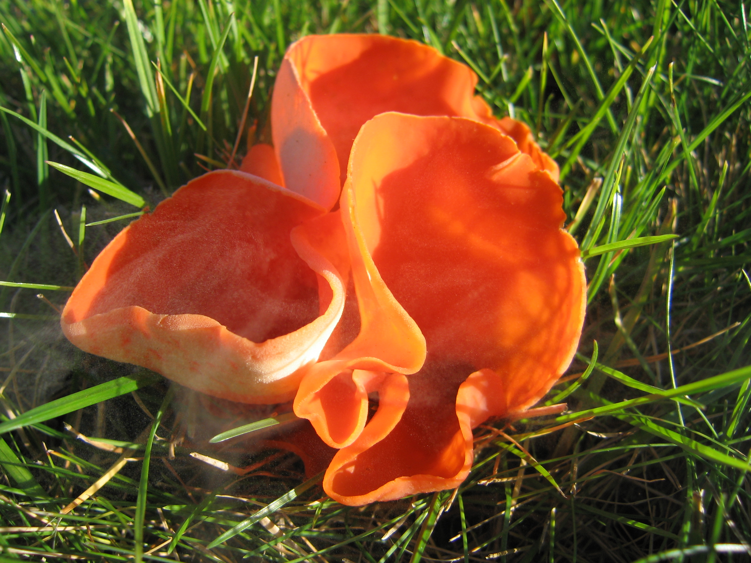 Aleuria aurantia and some "smoke" (LT: Oranžinis lekščiagrybis)